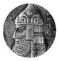 Аргишти I, царь Урарту